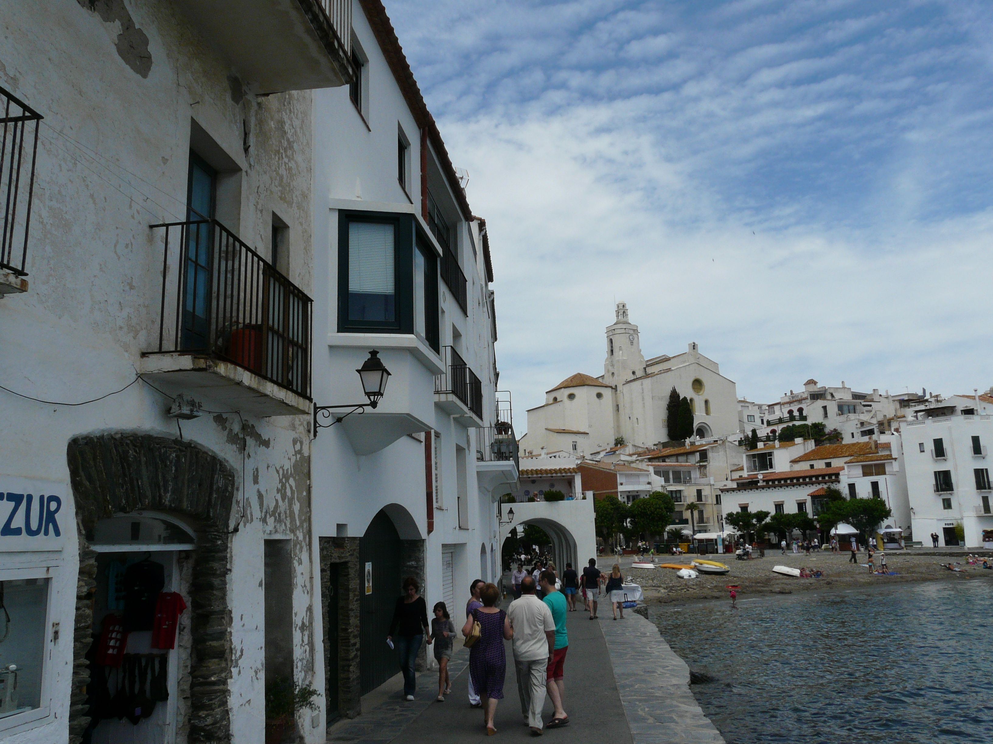 Casa al carrer Eduard Marquina, 25 (Cadaqués)